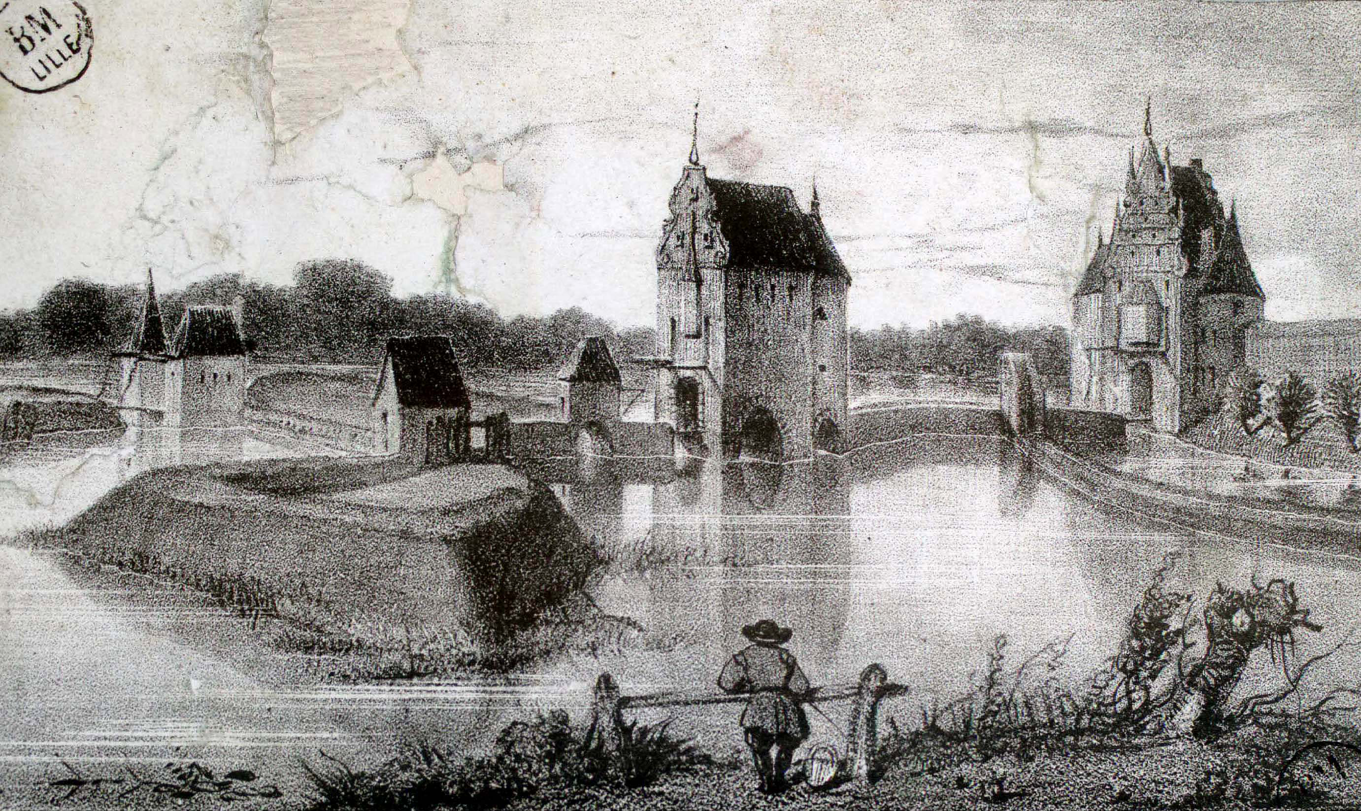 Ce fichier est recadré pour être utilisé dans les articles, pour le fichier d'origine voir : Titre du document: VIEILLE PORTE DE LA BARRE Type de document : gravure 13 x 11 cm